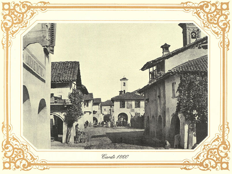 Cardè, 1860 - Corso Vittorio Emanuele II